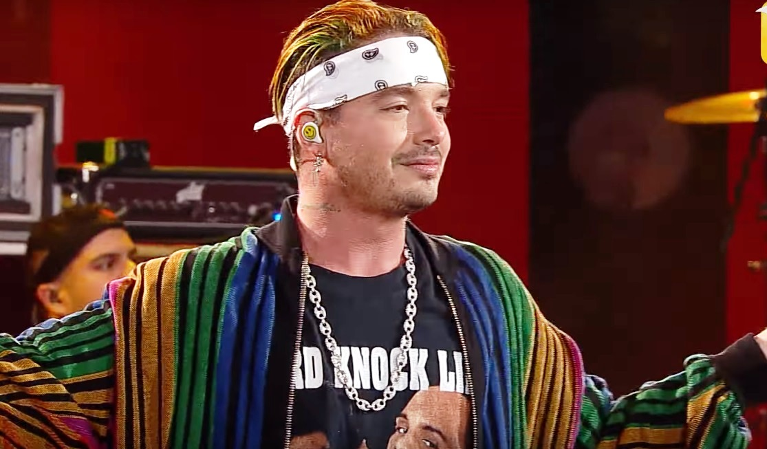 Directamente desde Medellín, Colombia, José Álvaro Osorio Balvin, conocido por su nombre artístico como J BALVIN, se presenta por primera ante el público chileno eligiendo al “monstruo” de la Quinta Vergara como primer jurado de su show, entregando una performance sobre el escenario que mantuvo encendida a las más de 15 mil personas que asistieron a esa noche de cierre del Festival de Viña 2017.